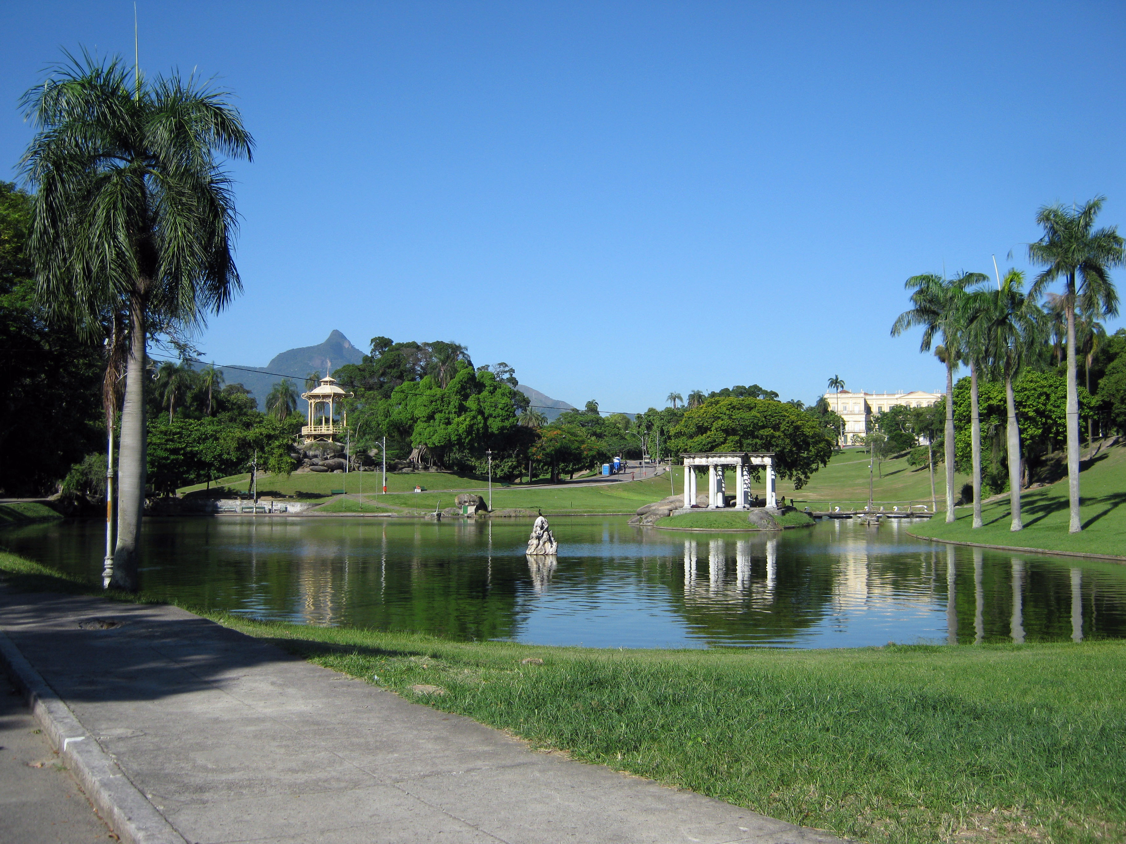 Quinta da Boa Vista - Lago maior com as esculturas de D. Nicolina Vaz de Assis.